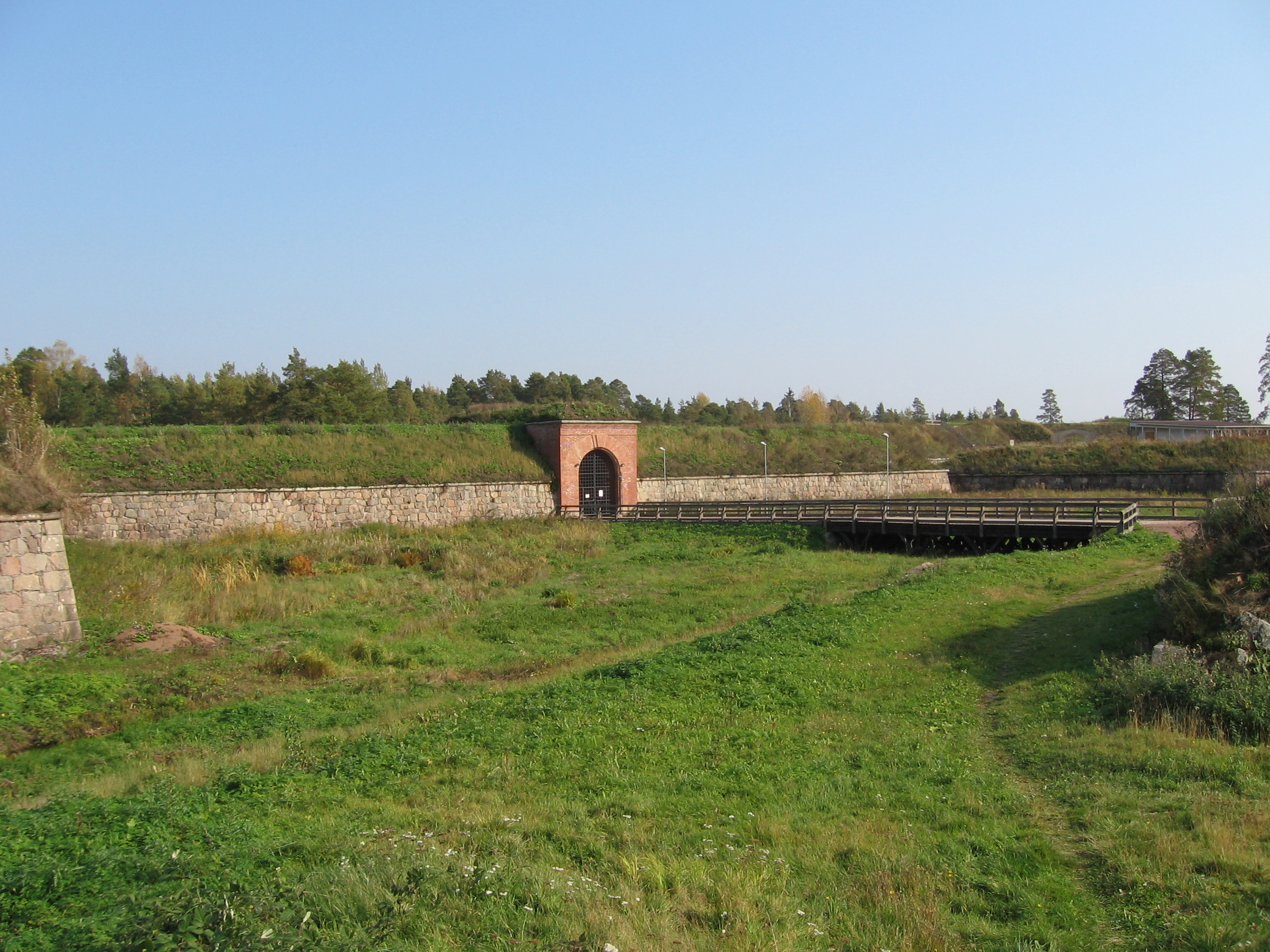 Kyminlinnan pääportti